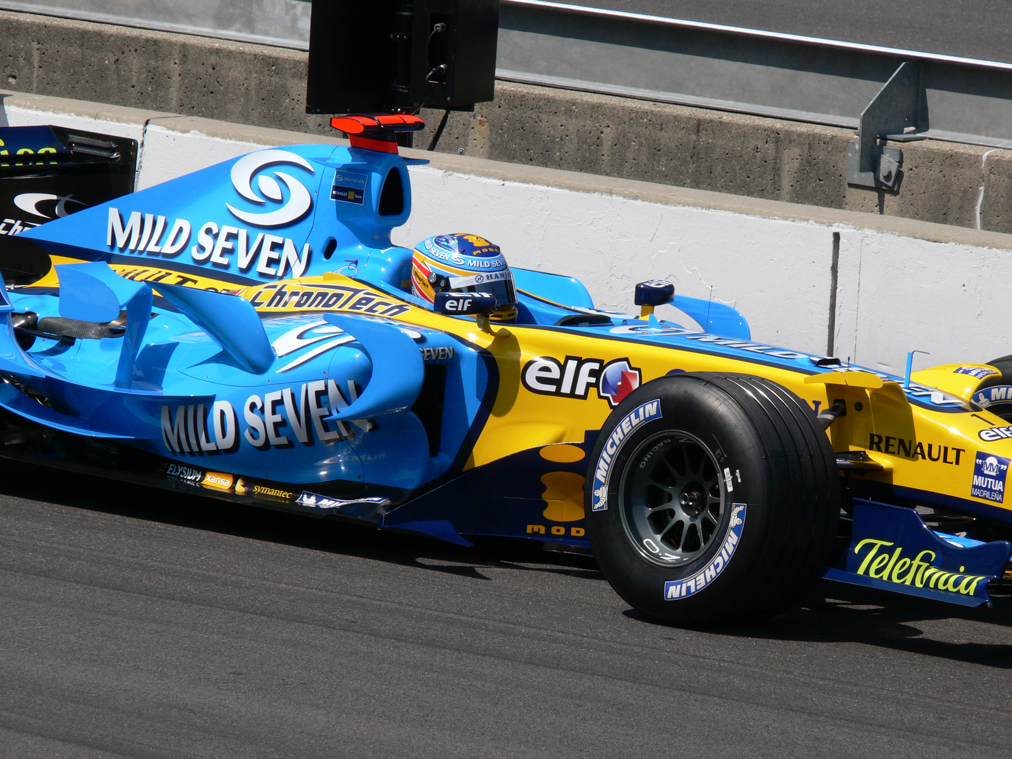 Fernando Alonso lors du Gand Prix des USA 2006 sur Renault R26.